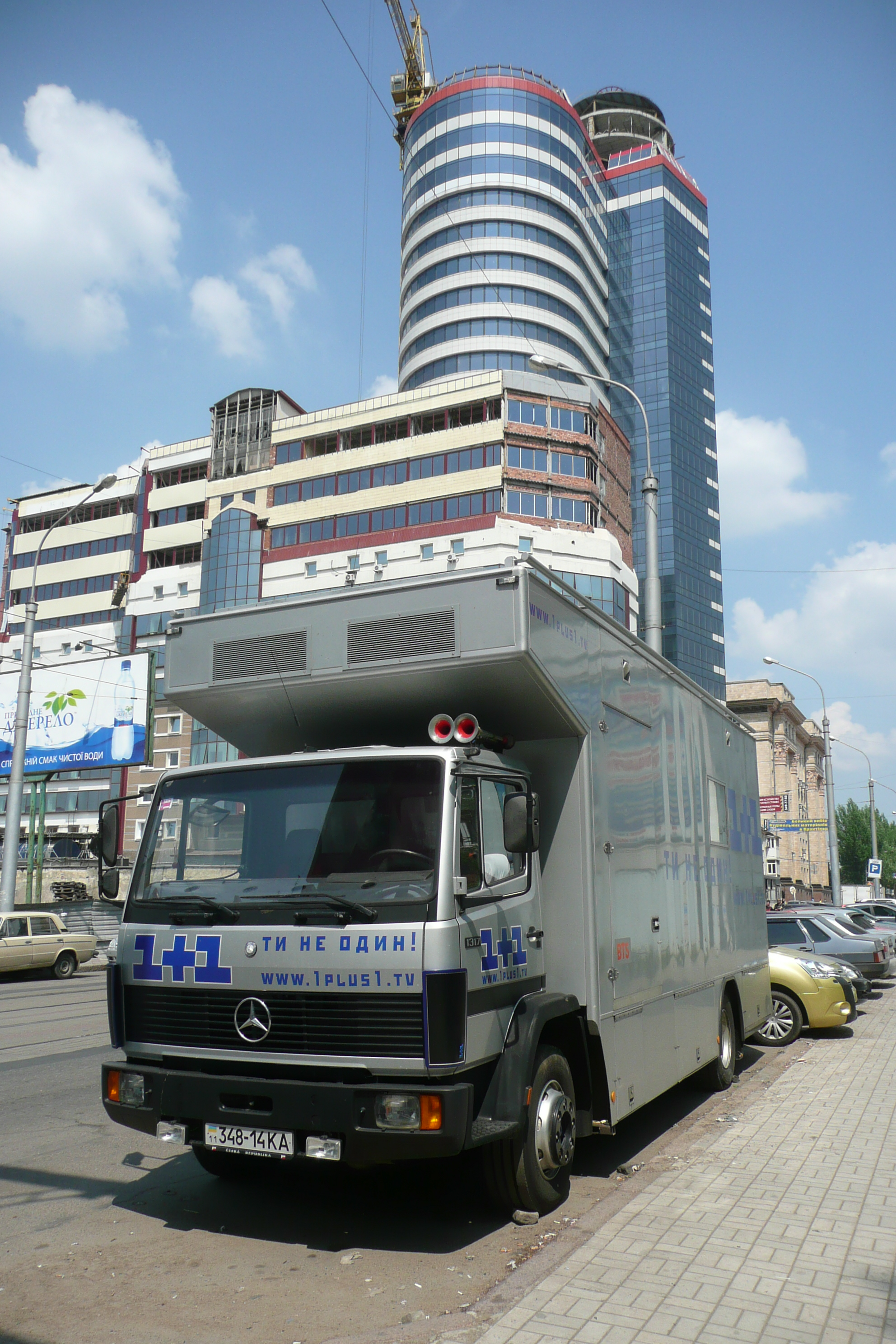 Транспорт в Донецке